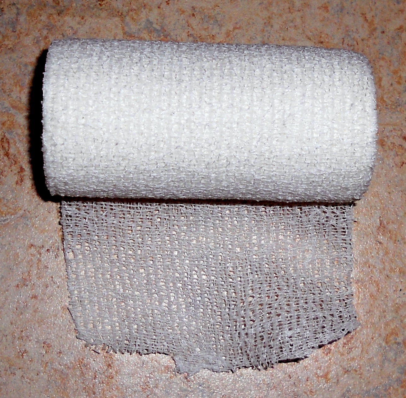 Eine Rolle Peha-Haft